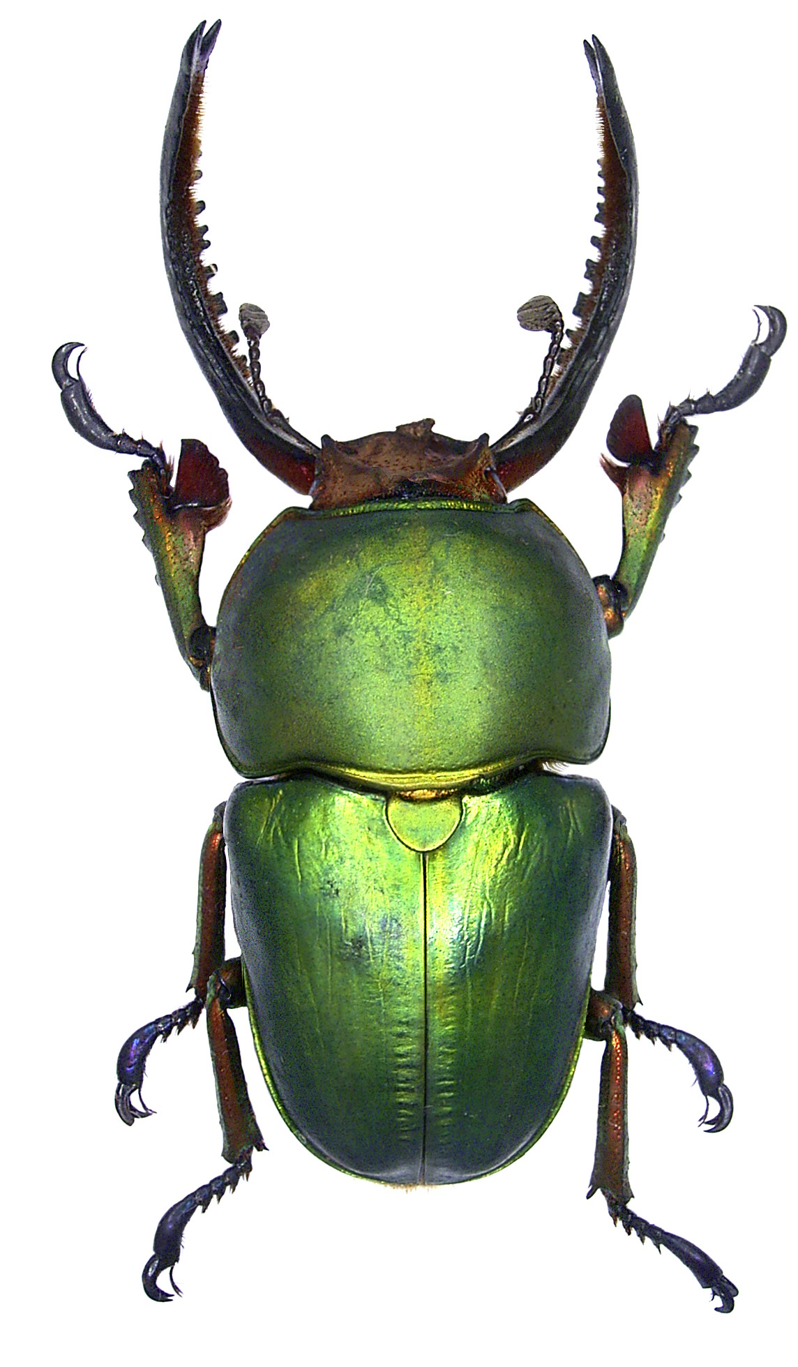 Familie: Lucanidae Größe: 45 mm Fundort: Indonesien, Irian Jaya, Manokwari-Prov., Ransiki leg.det. A.Skale, 2007 Foto: U.Schmidt, 2007